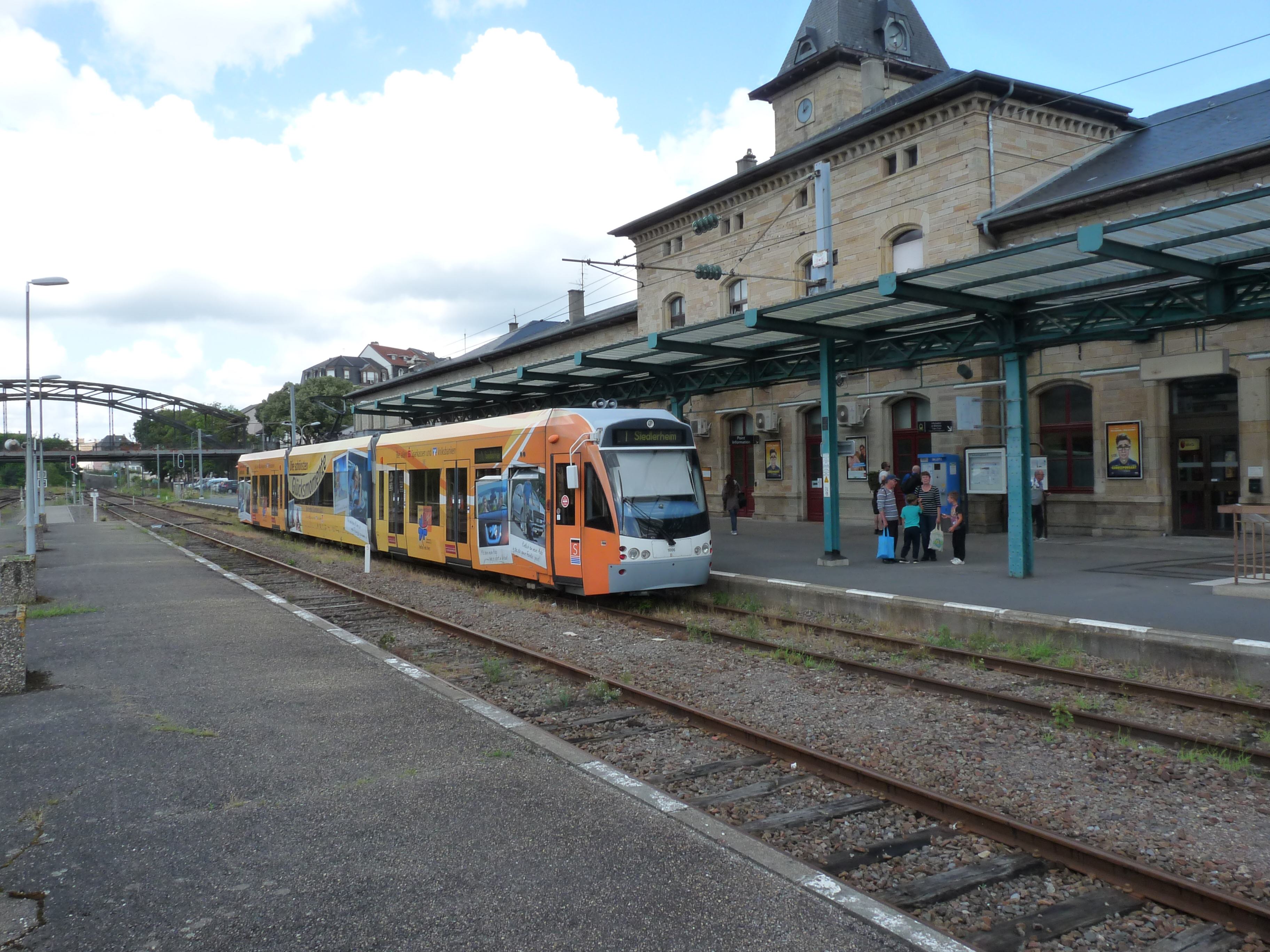 Duitse Saarbrucken tram in Sarreguemines